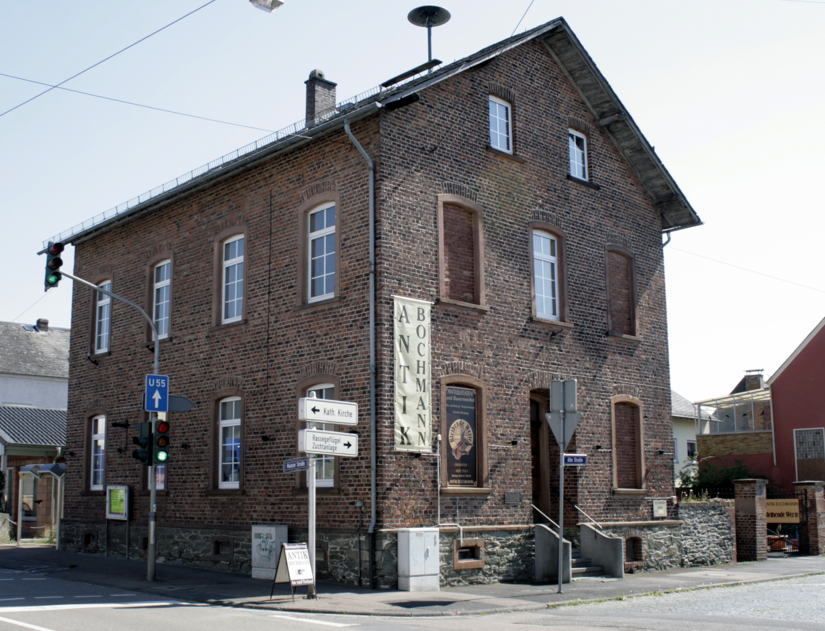 Alte Schule in Linter, Deutschland